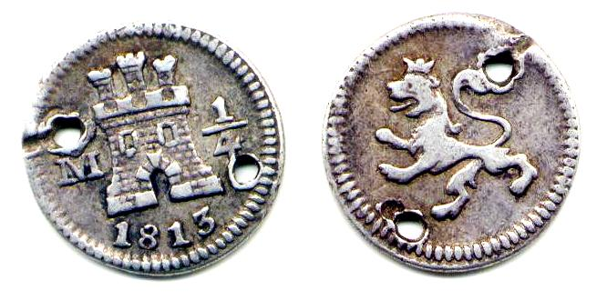 Cuartilla de México de 1813.